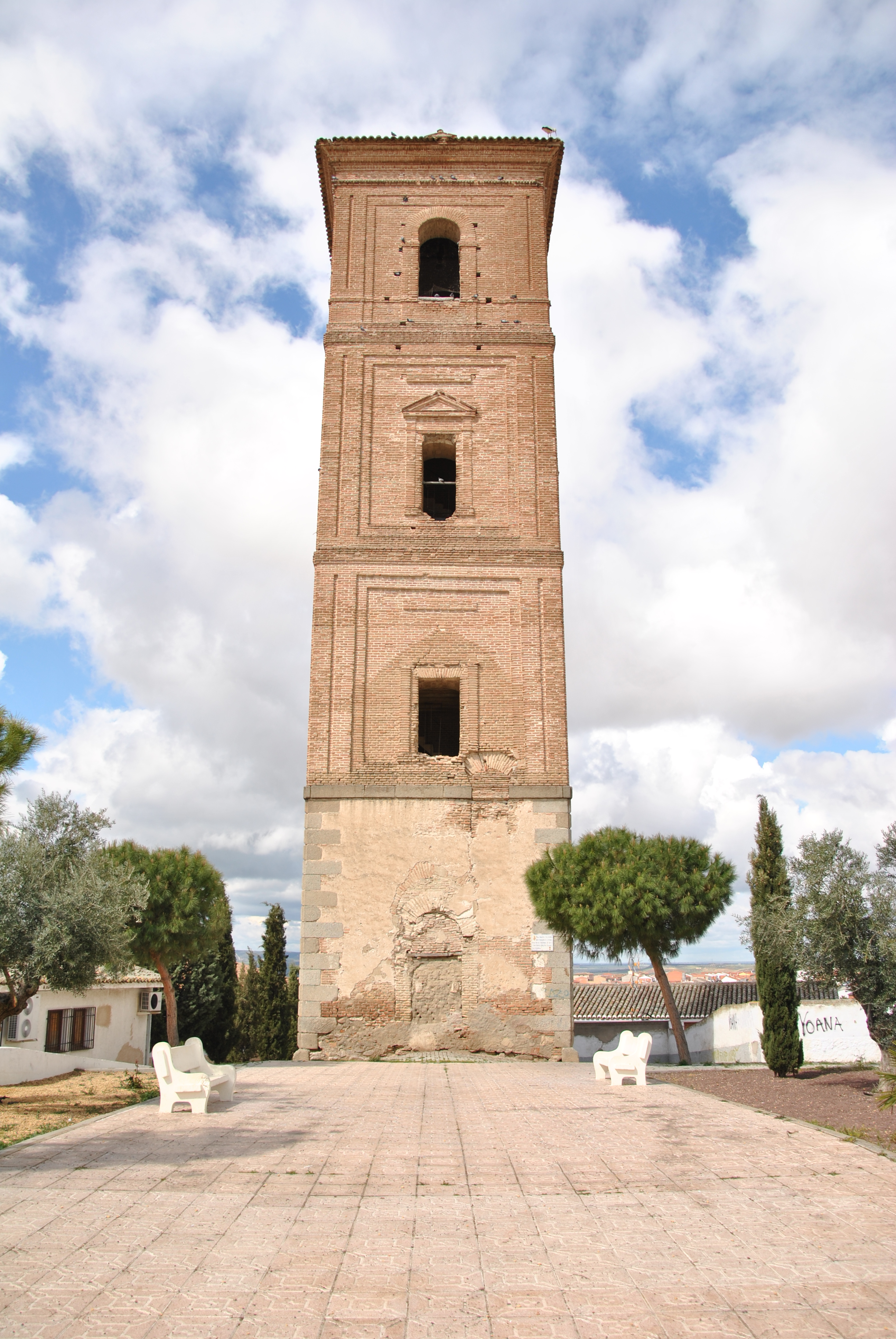 La Torre de San Miguel en La Puebla de Montalbán (Toledo, Castilla-La Mancha, España).